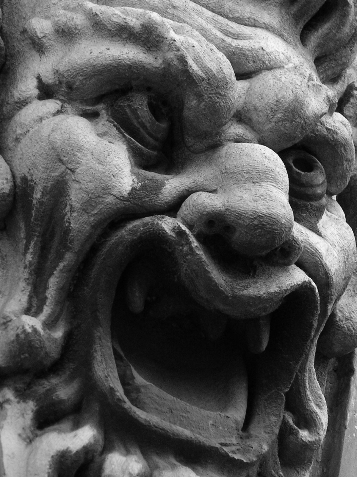 Mascherone soprastante un portone delle stalle ducali.Modena.